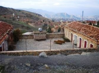 Kalâ Beni Abbès La cour et les classes